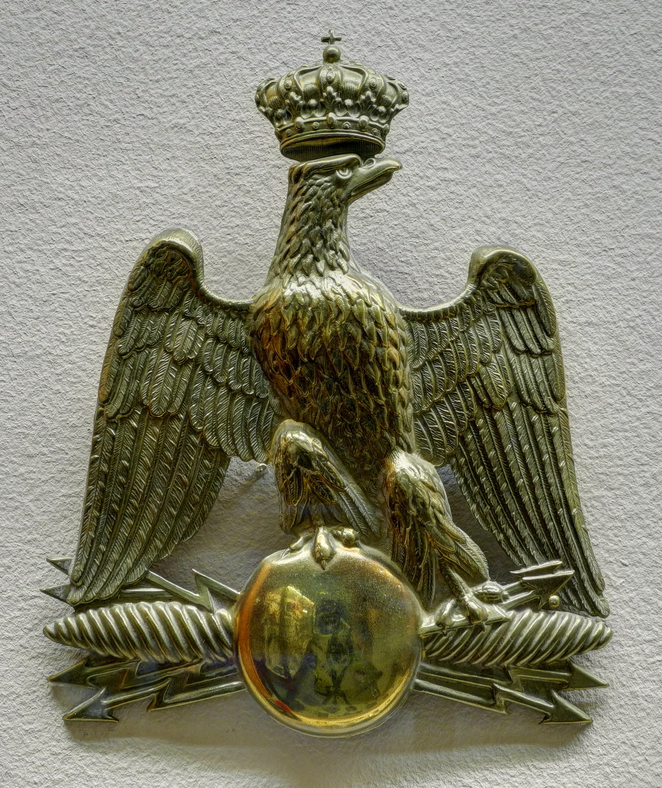 Musée d'Histoire : Aigle de Shako (HDR). Service administration France - modèle 1860 CO 74